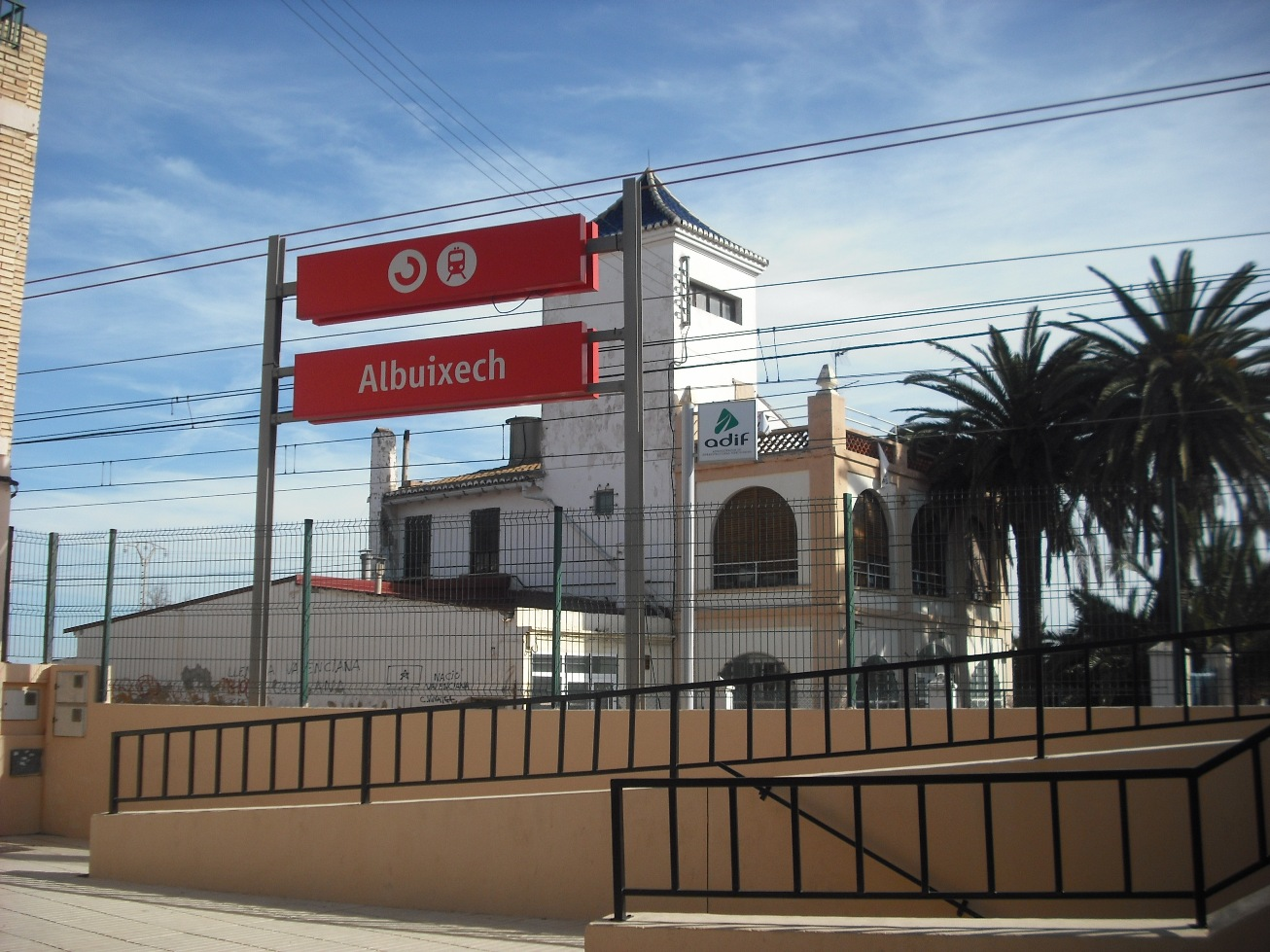 Ermita situada en el barrio del Forn de Albuixech